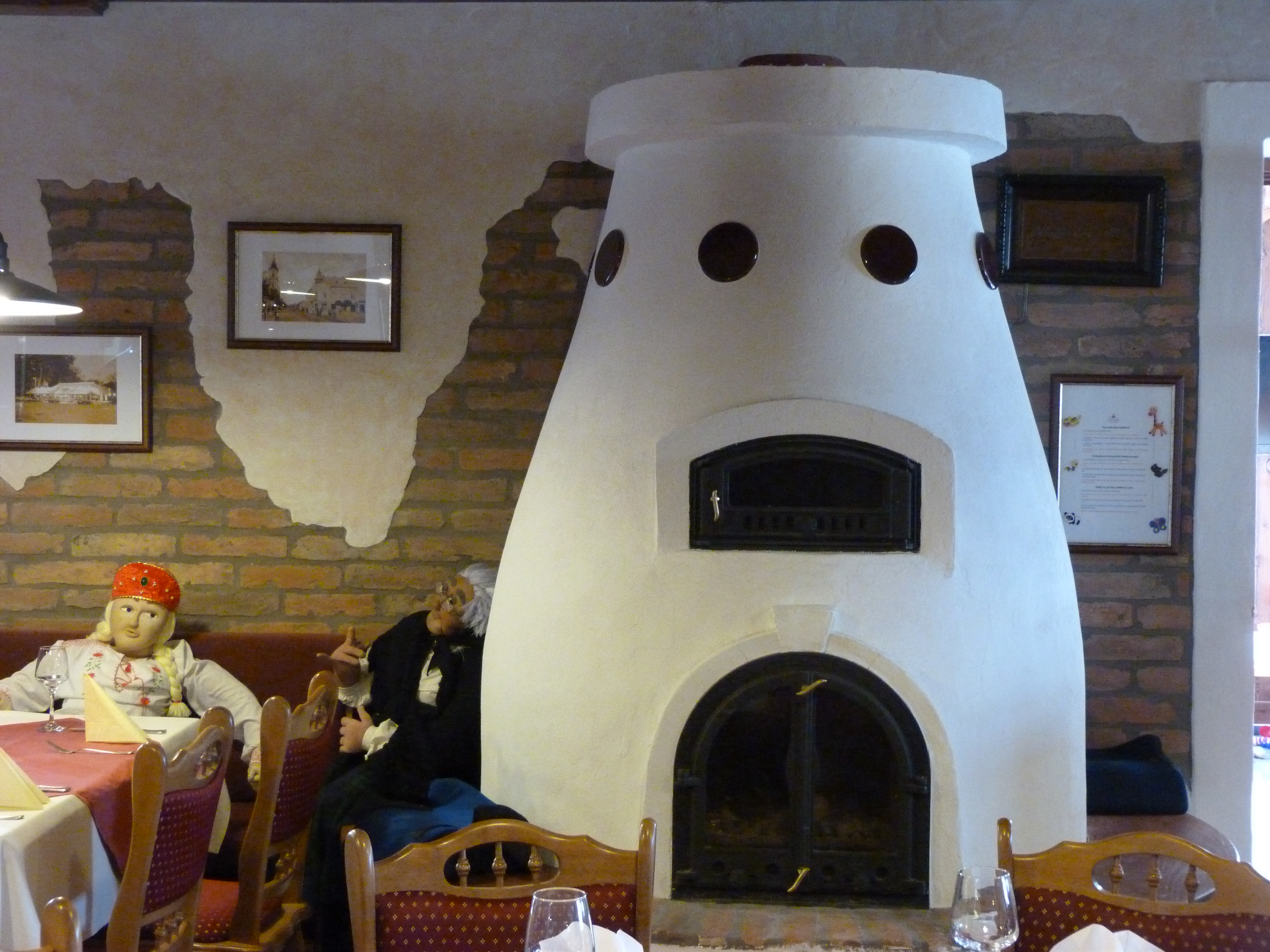 Kemence. A felvétel 2015. február 3-én készült Siófokon, a Piroska Csárdában.